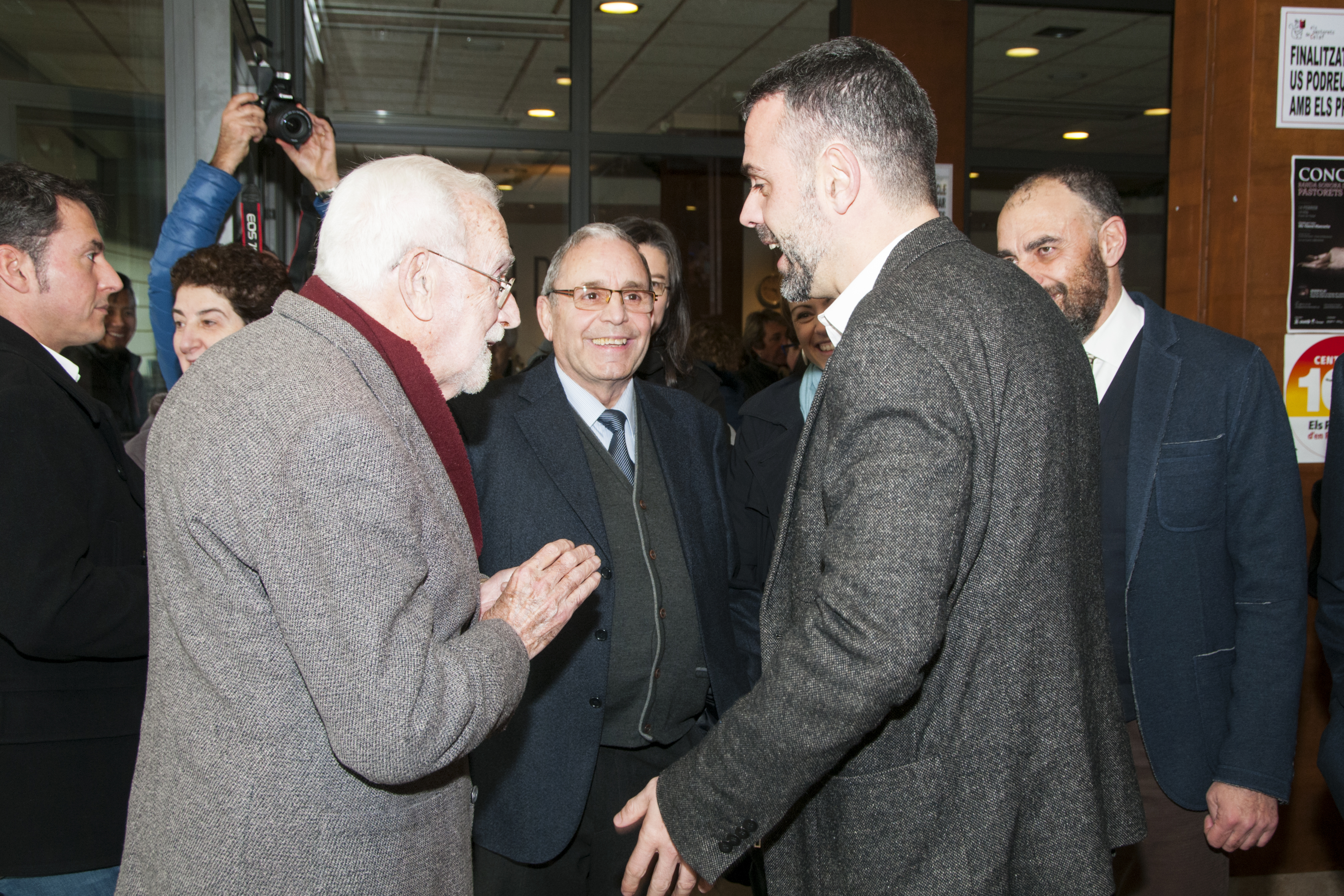 Conseller de Cultura Santi Vila i Ramon Folch i Camarasa fill de l'autror